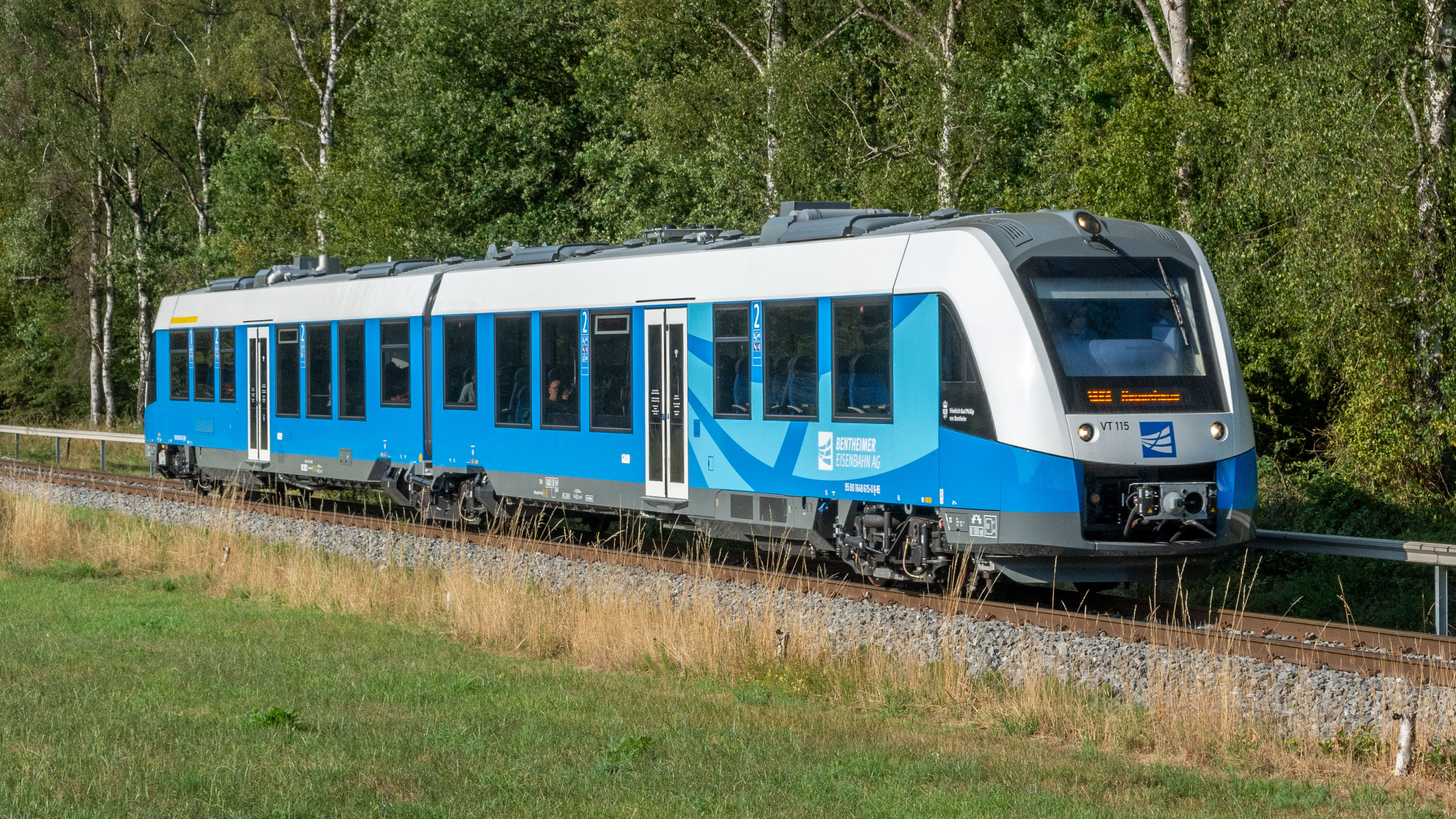 Met een vijftal Coradia Lint dieseltreinstellen verzorgd de Bentheimer Eisenbahn sind begin juli 2019 een personentreindienst tussen Bad Bentheim en Neuenhaus. Treinstel BE VT115 rijdt hier tussen Bentheim en Quendorf als RB56. De door Alstom geleverde treinen op het 28-km lange traject tussen Bad Bentheim – Nordhorn – Neuenhaus.